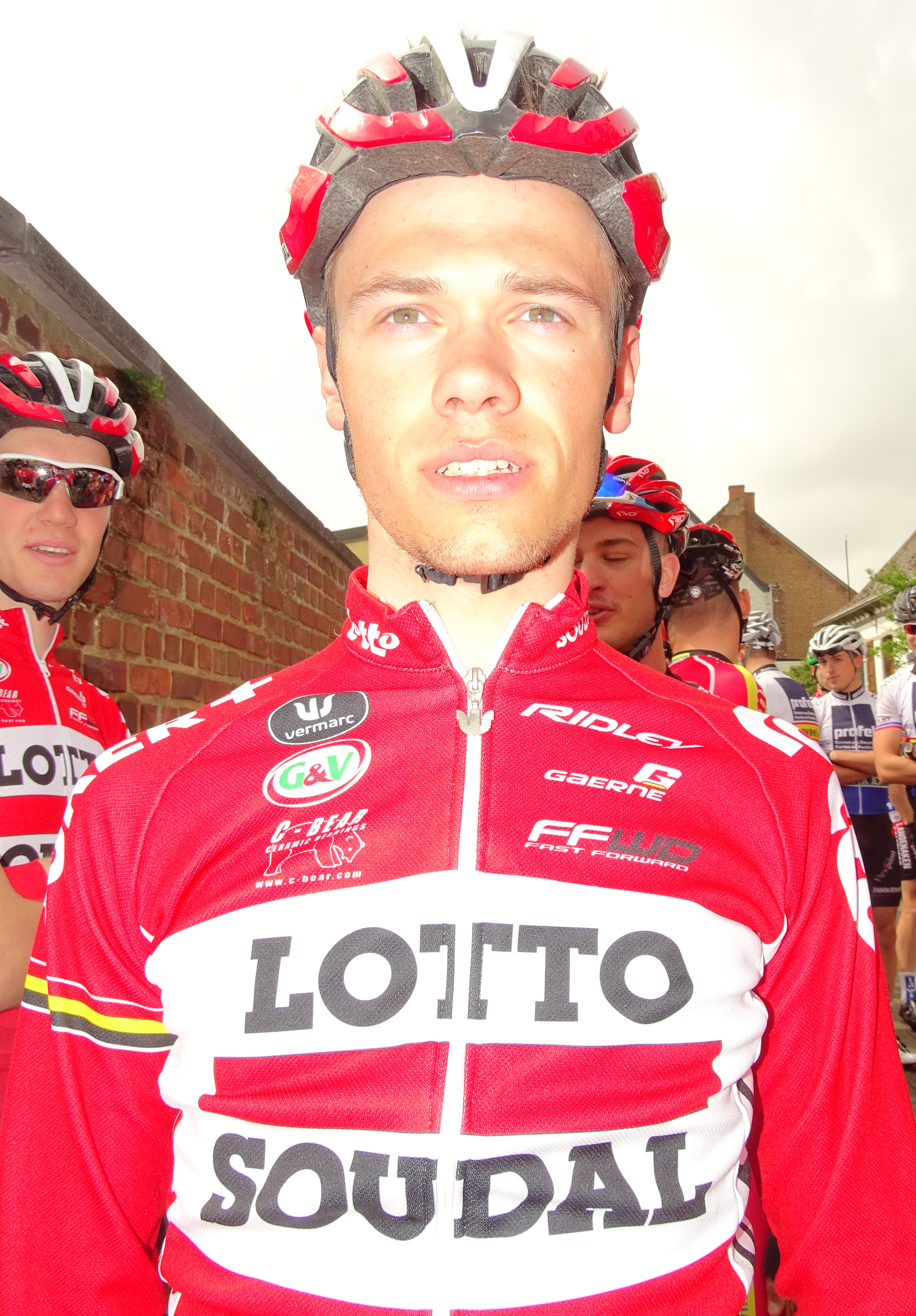 Reportage réalisé le dimanche 17 mai à l'occasion du départ du Grand Prix Criquielion 2015 à Silly, Belgique.